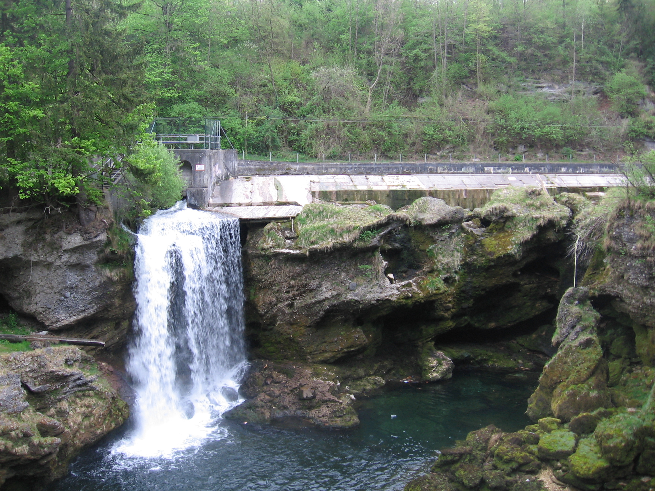 Den Traunfall bei Steyrermühl bei niedrigem Wasserstand